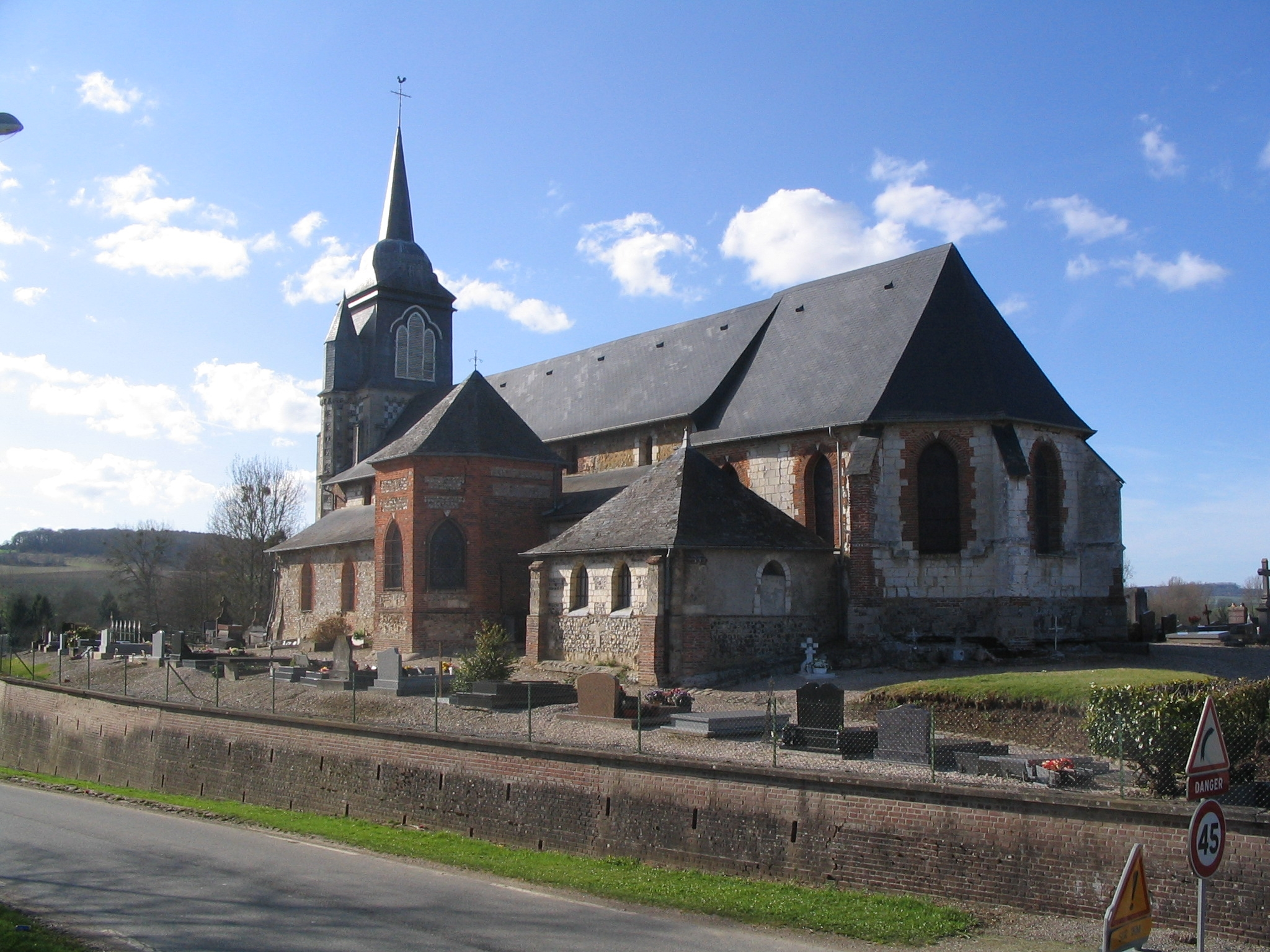 France, Seine-Maritime, Grandcourt, l'église Saint-Martin.